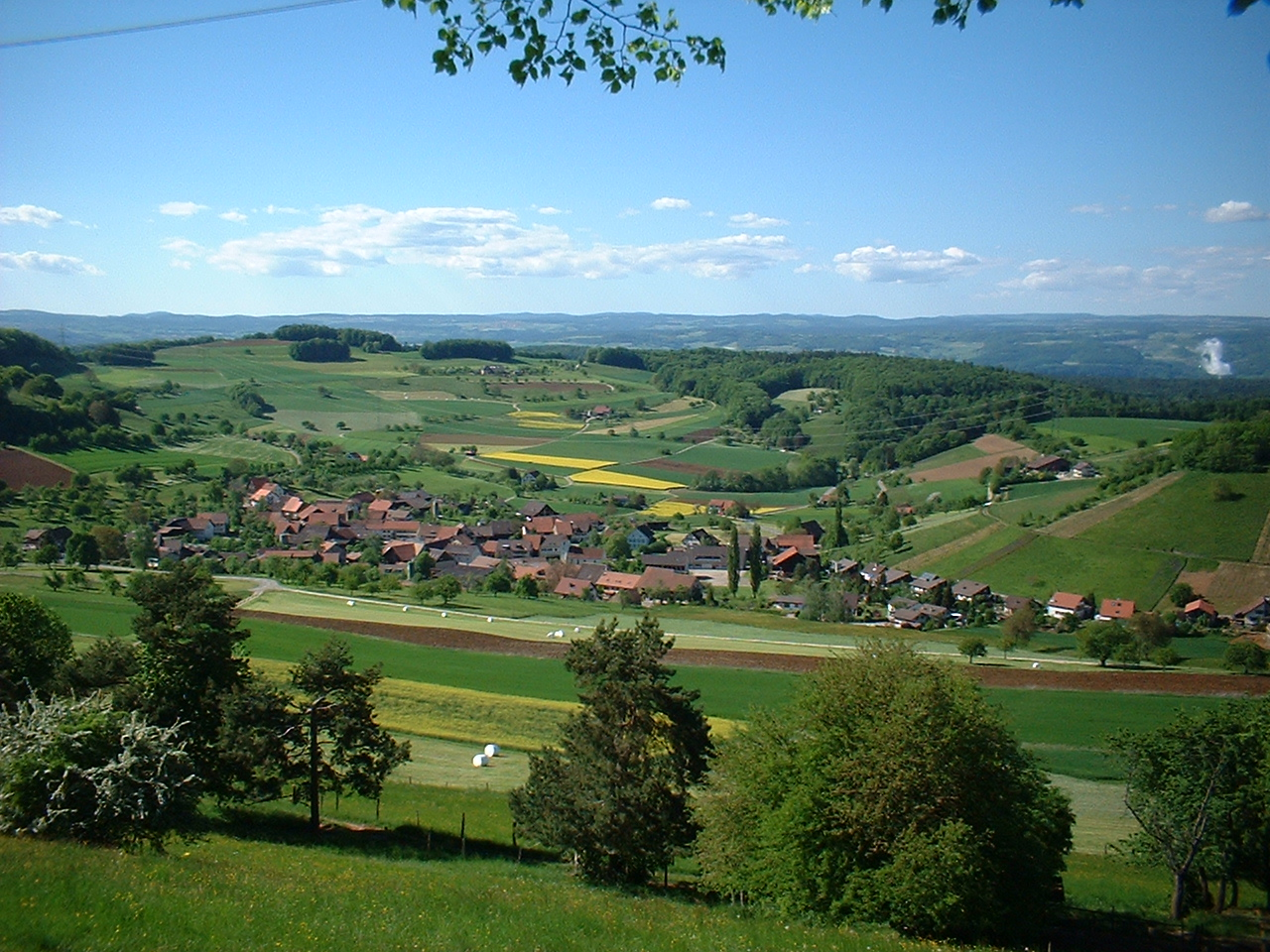 Mandach von Süden her gesehen